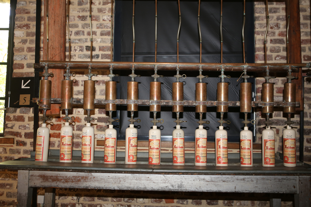 Een bottelapparaat, in het Nationaal Jenevermuseum Hasselt, tijdens een bezoek op 26/10/2013.